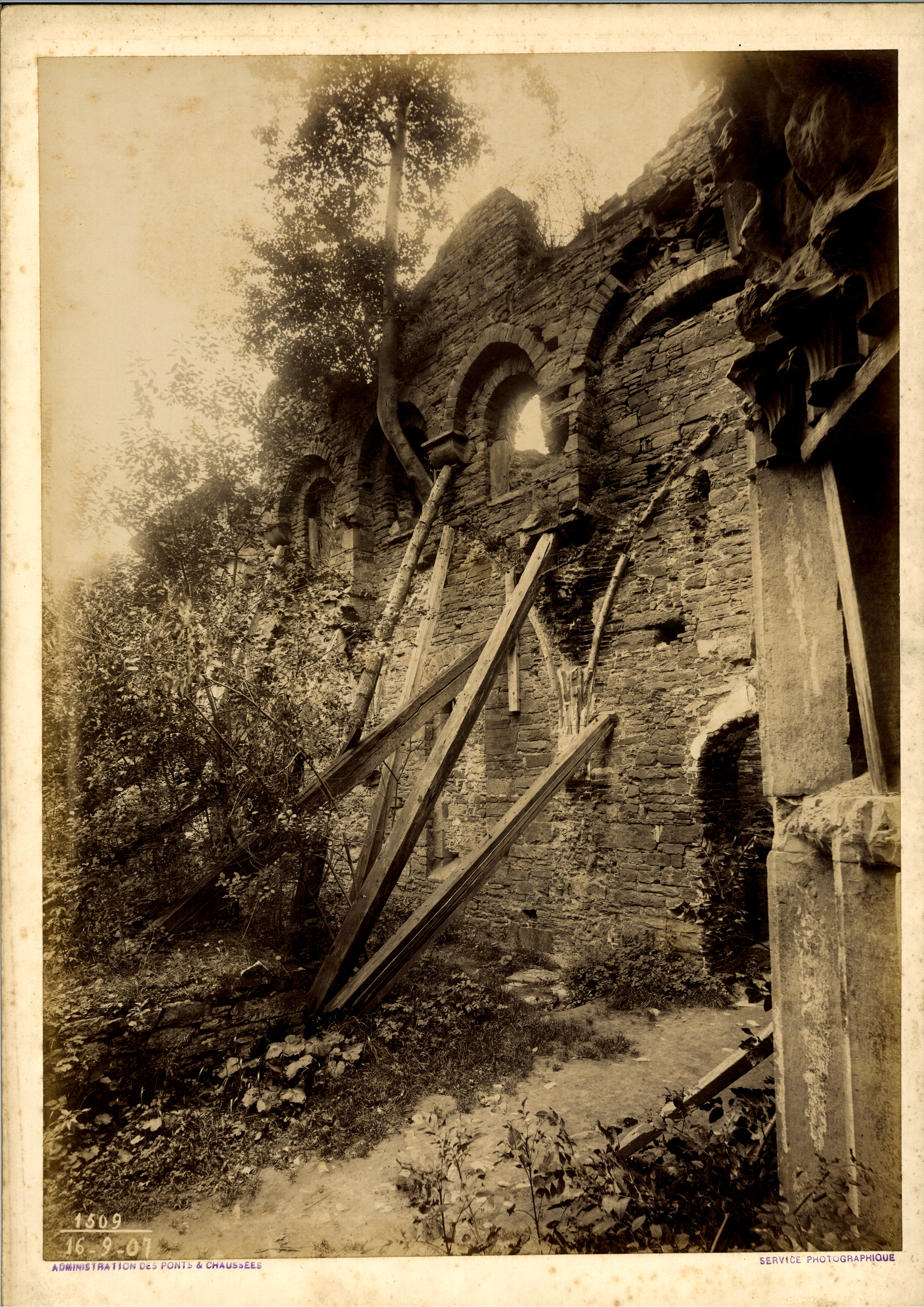 Bâtiment des convers en cours de restauration à la fin du XIXe siècle